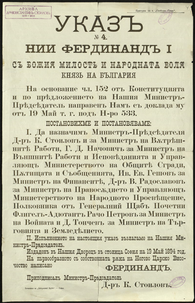 Указ за назначаване на правителството на Константин Стоилов